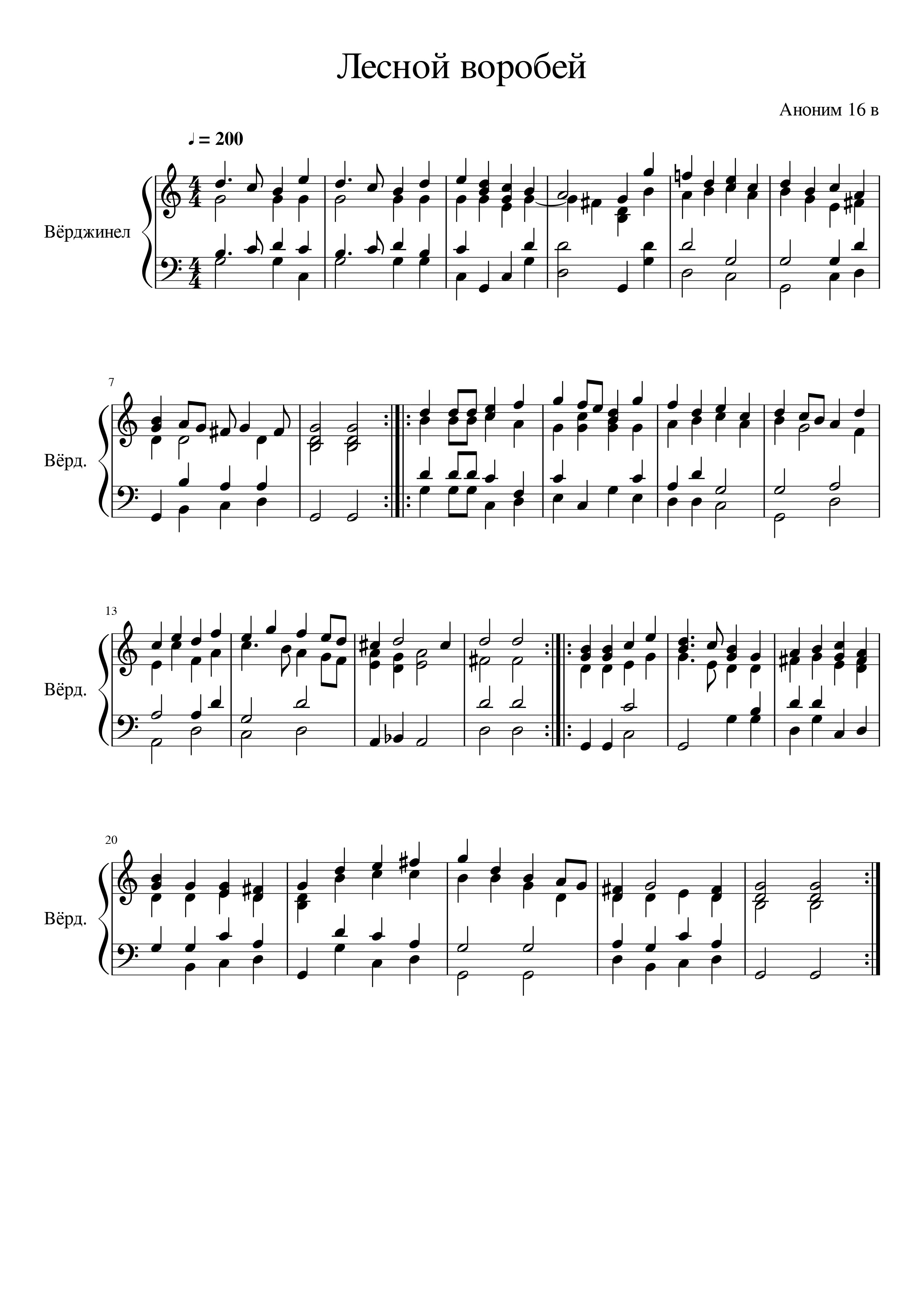 Пьеса № 13 из "Книги Муллинера"